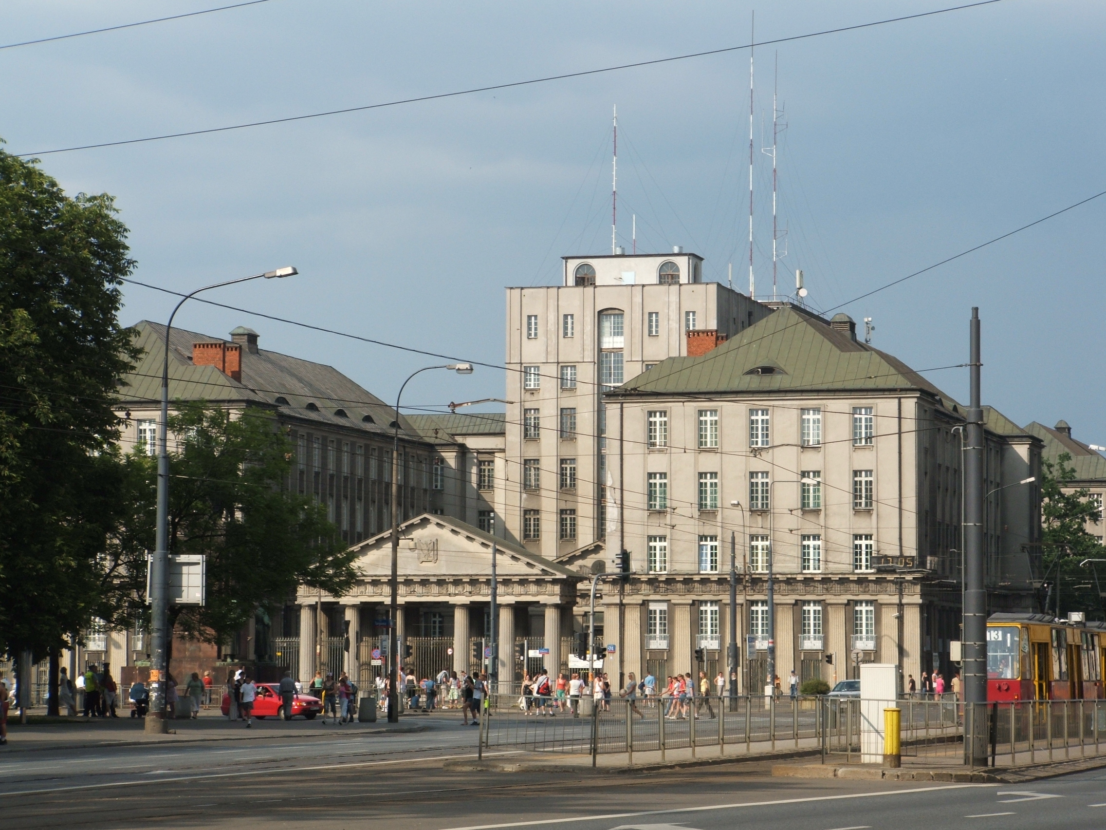 Gmach Dyrekcji PKP w Warszawie